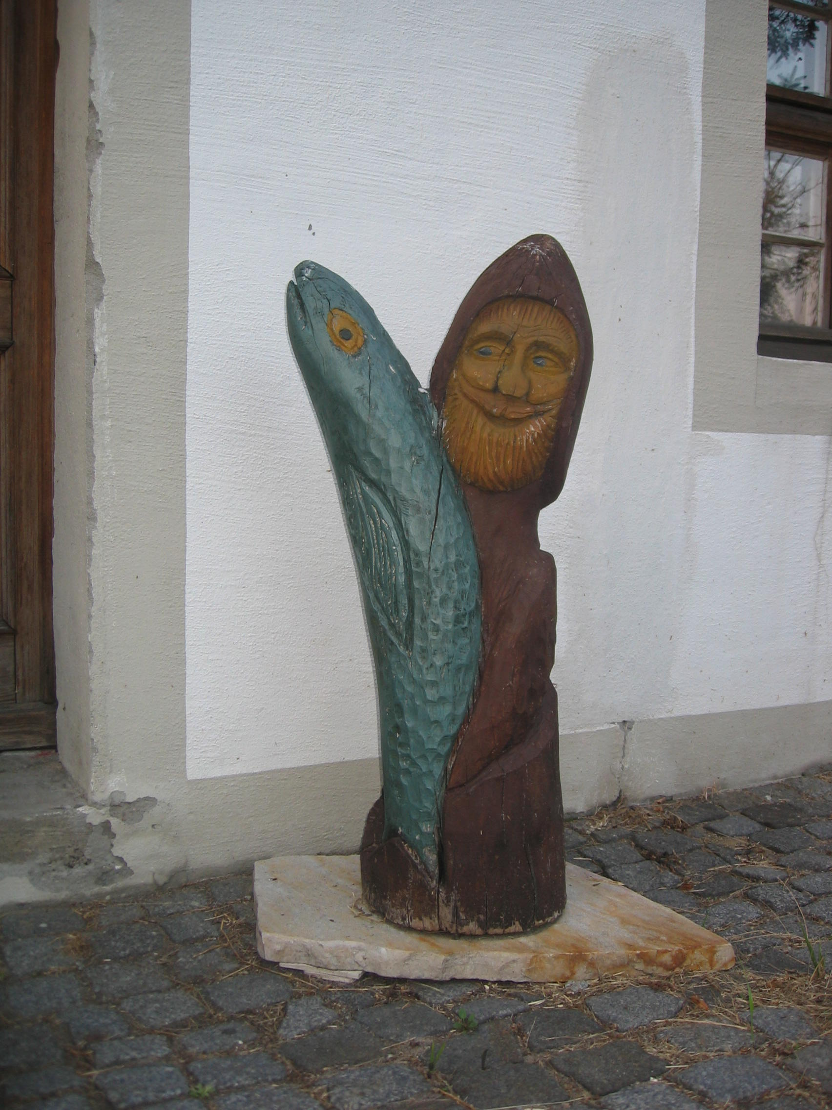 Gutshaus in Ruhland, Holzfigur rechts am Eingang; "Fischer" geschaffen von Rudolf Schulze